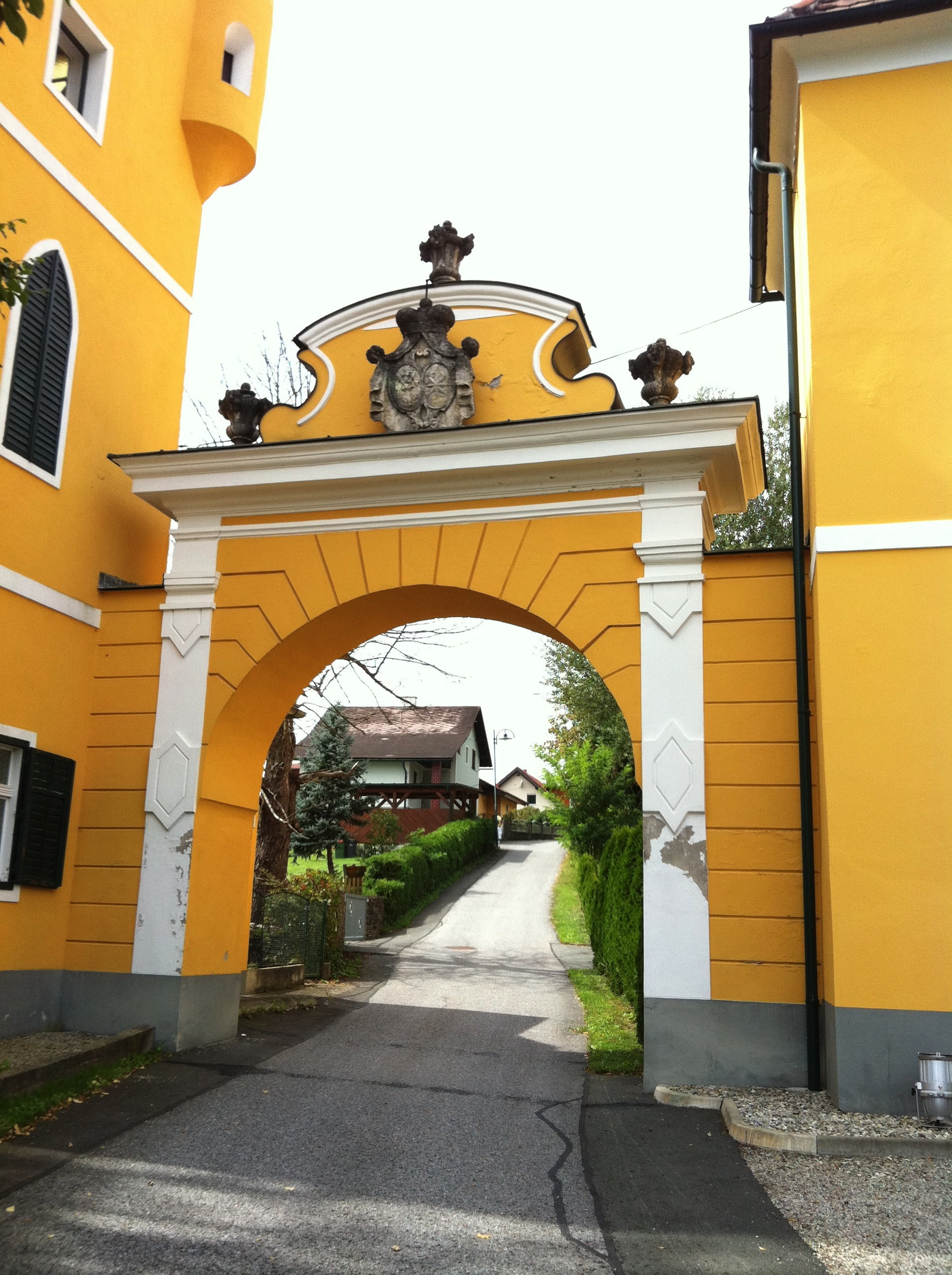 Torbogen der ehemaligen Holzbrücke über die Mur bei Ehrenhausen.